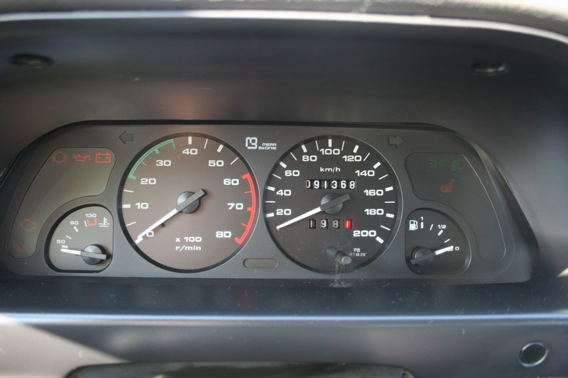 Zestaw wskaźników Polonez Caro Plus